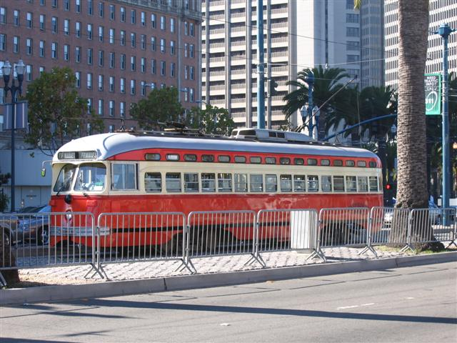 Трамвай на МЮНИ по линия "F Маркет" в Сан Франциско, щата Калифорния, САЩ. (авторска снимка)